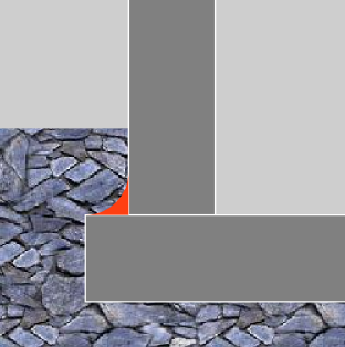 Hohlkehle